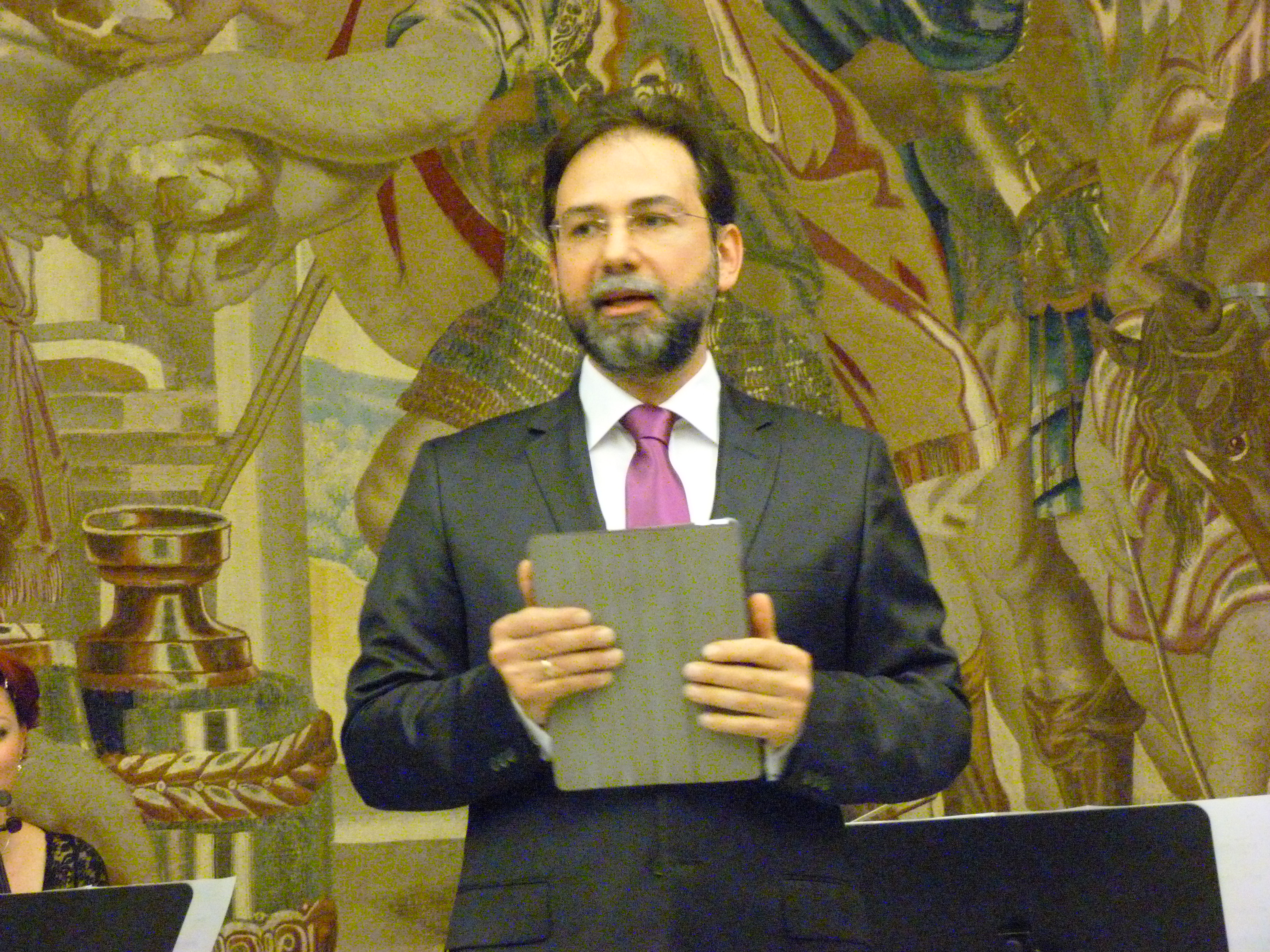 A felvételek 2014. április 23 –án szerdán készültek Budapesten, az Országos Széchenyi Könyvtárban. A Török Köztársaság Magyarországi Nagykövete, Szőcs Géza miniszterelnöki főtanácsadó, Fodor Pál Magyar Tudományos Akadémia Bölcsészettudományi Kutatóközpontja, a Yunus Emre Enstitüte elnökhelyettese, a Yunus Emre Enstitüte igazgatója, Káldos János az Országos Szécheniy Könyvtár megbízott főigazgatója.